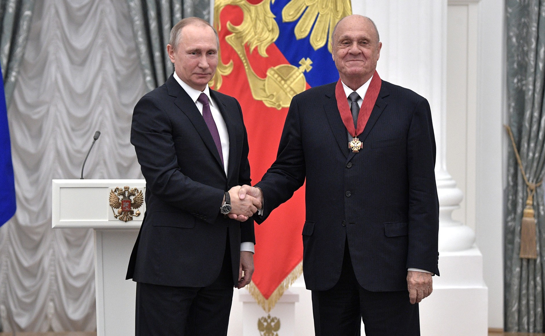 На церемонии вручения государственных наград. Орденом «За заслуги перед Отечеством» II степени награждён Владимир Меньшов – кинорежиссёр-постановщик Киноконцерна «Мосфильм».